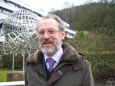 Foto di Gianni Dal Maso